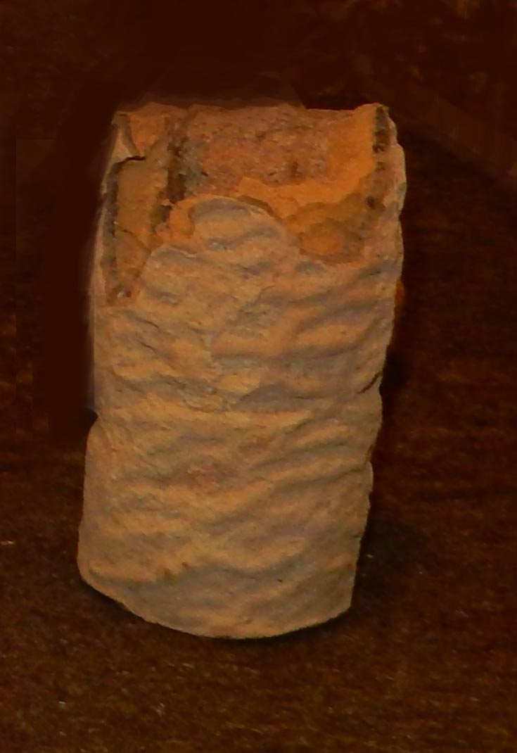 豊橋市地下資源館所蔵の高師小僧 撮影許諾済み